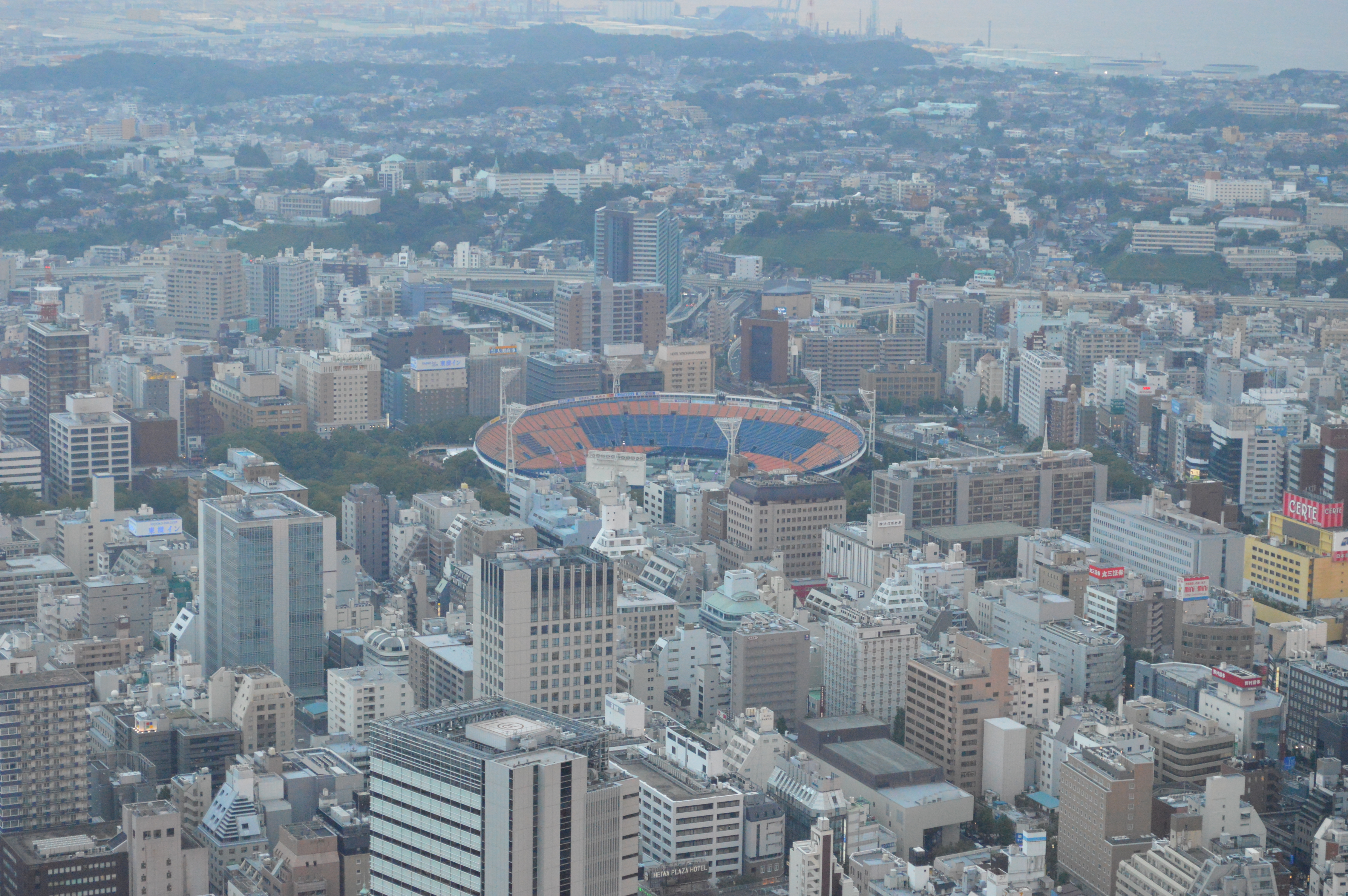 横浜ランドマークタワーのスカイガーデンから眺める横浜スタジアム